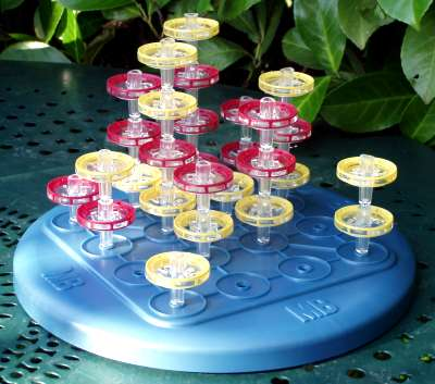 Jeu de Puissance 4 advance (Sogo)